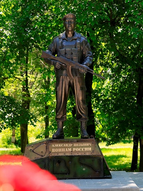 Памятник Александру Позыничу в Новочеркасске